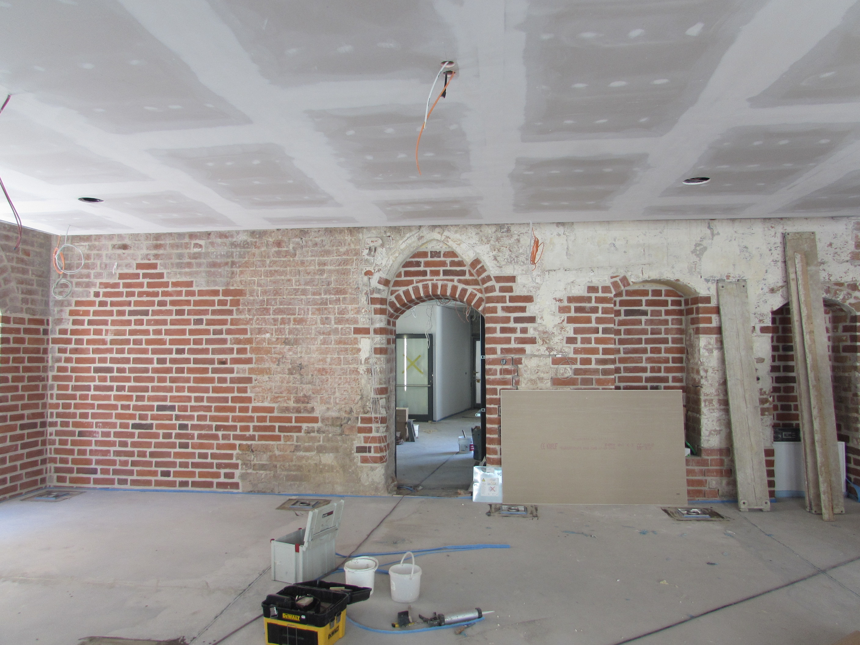 gotisches haus brandenburg an der havel innen